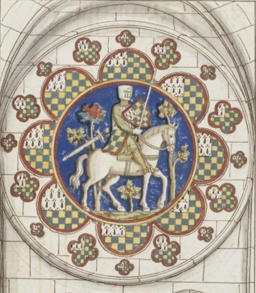 Vitrail de Notre-Dame de Chartres : Pierre de Dreux, dit Mauclerc, duc de Bretagne